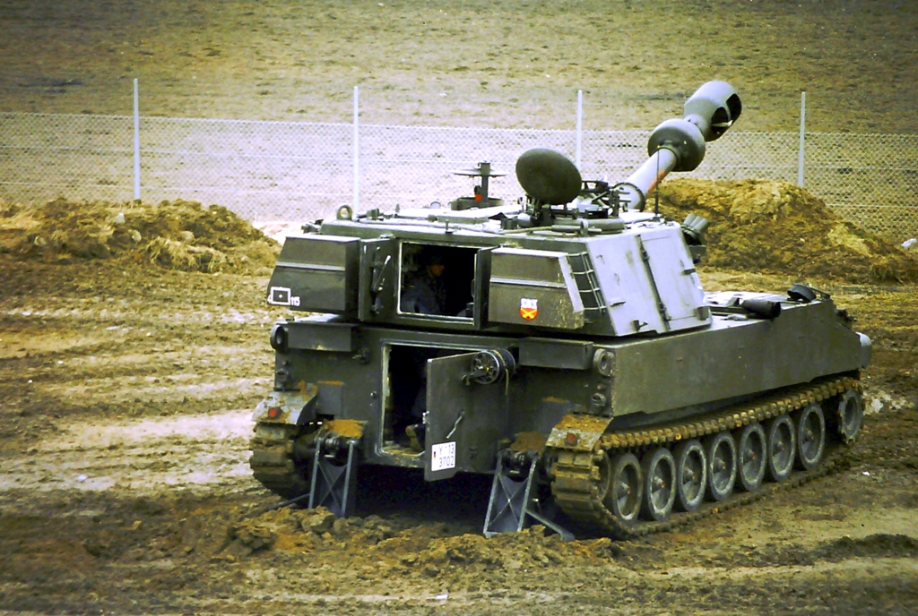 Bundeswehr M109 bei einem Manöver im Jahr 1982.